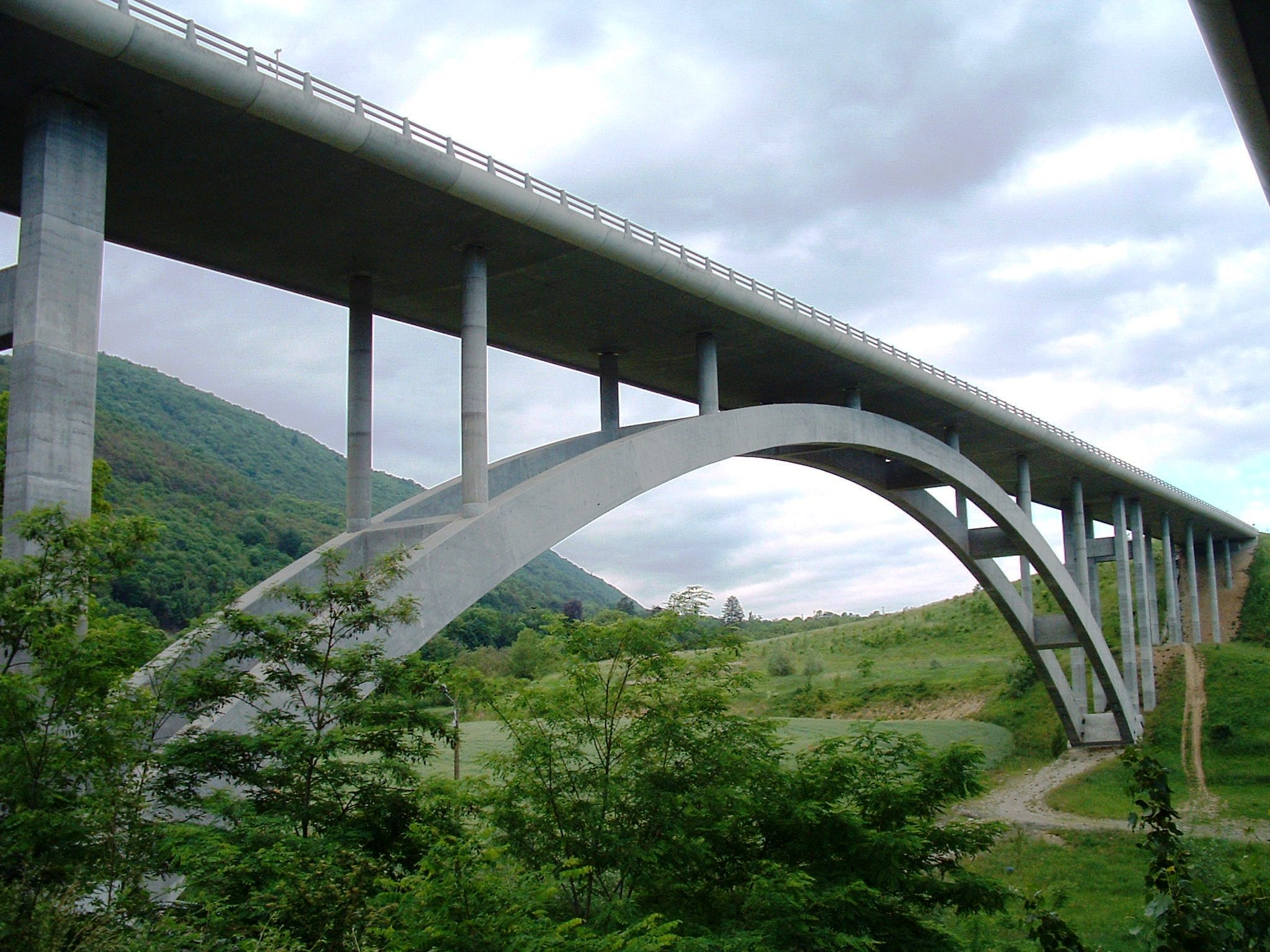 A51 - Viaduc du Crozet - Pont est